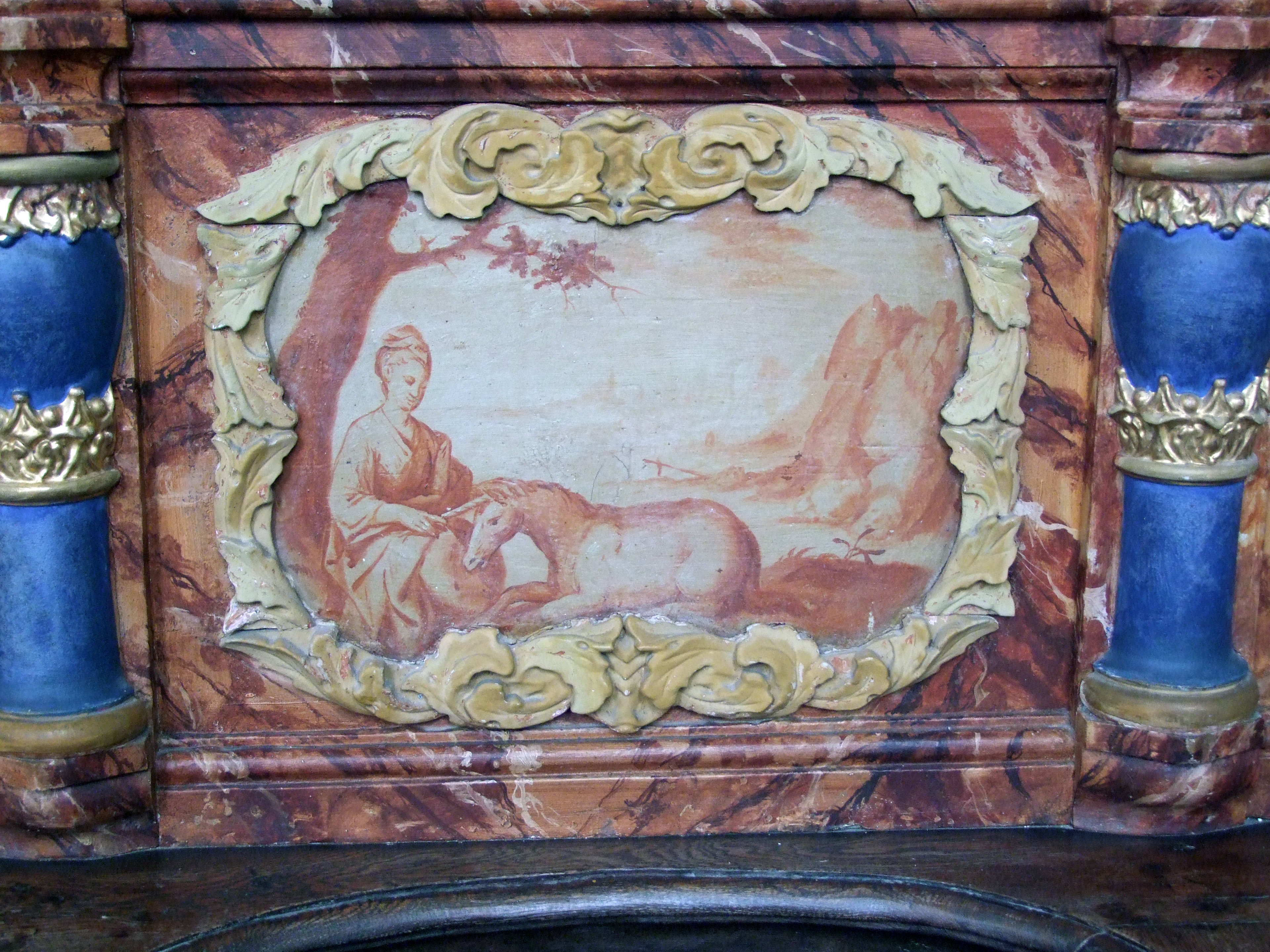 Südliches Chorgestühl. 1713/20 für die Pfarrkirche St. Stephan in Mindelheim entstanden.